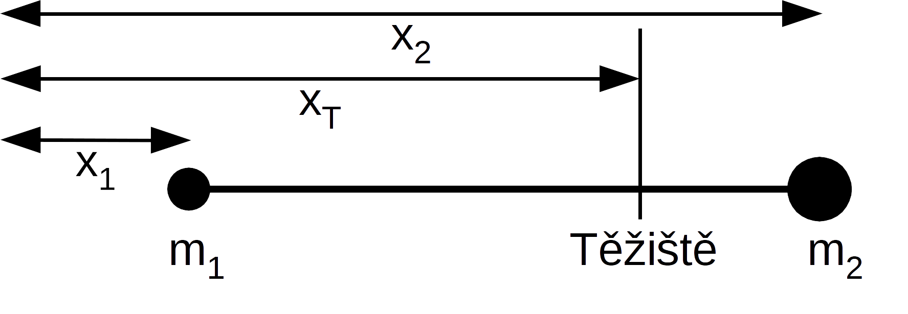 Těžiště je bod, kde se vyrovnává kroutící moment jednotlivých bodů.